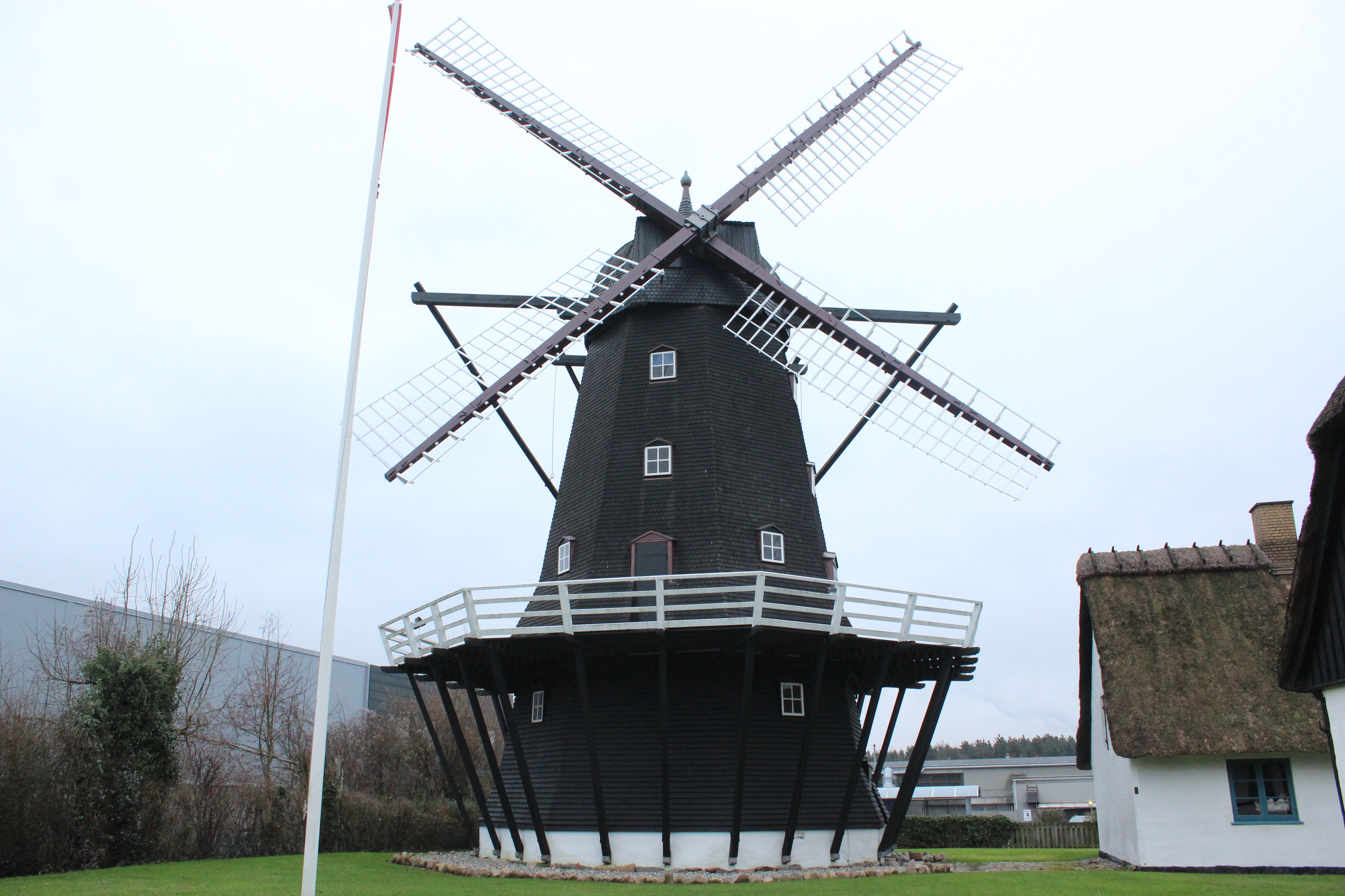 Ejegod Mølle i Nykøbing-Falster